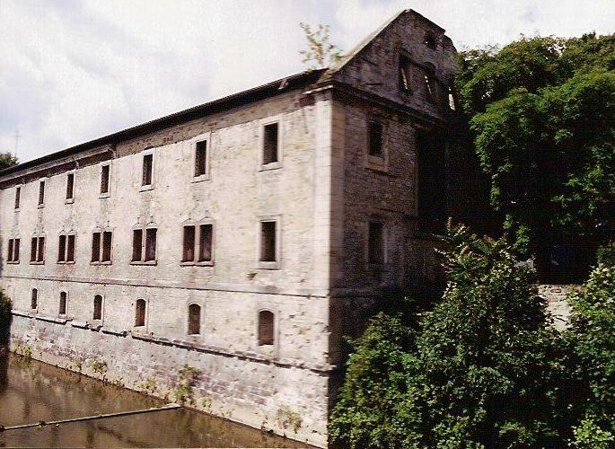 Das Karlshospital in Kassel, eigene Aufnahmen von Carroy im Sommer 2005. 14:23, 11. Dez 2005 Carroy 685 x 500 (93903 Byte) (Das Karlshospital in Kassel, eigene Aufnahmen im Sommer 2005. )